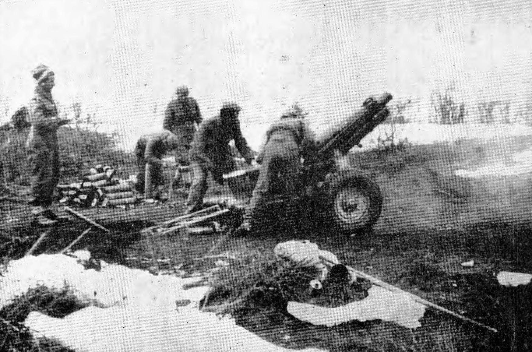 Brdska havbica 75 mm v bojih za Mostar od 6. do 14. februarja 1945